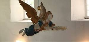 Besonderheit der Kirche